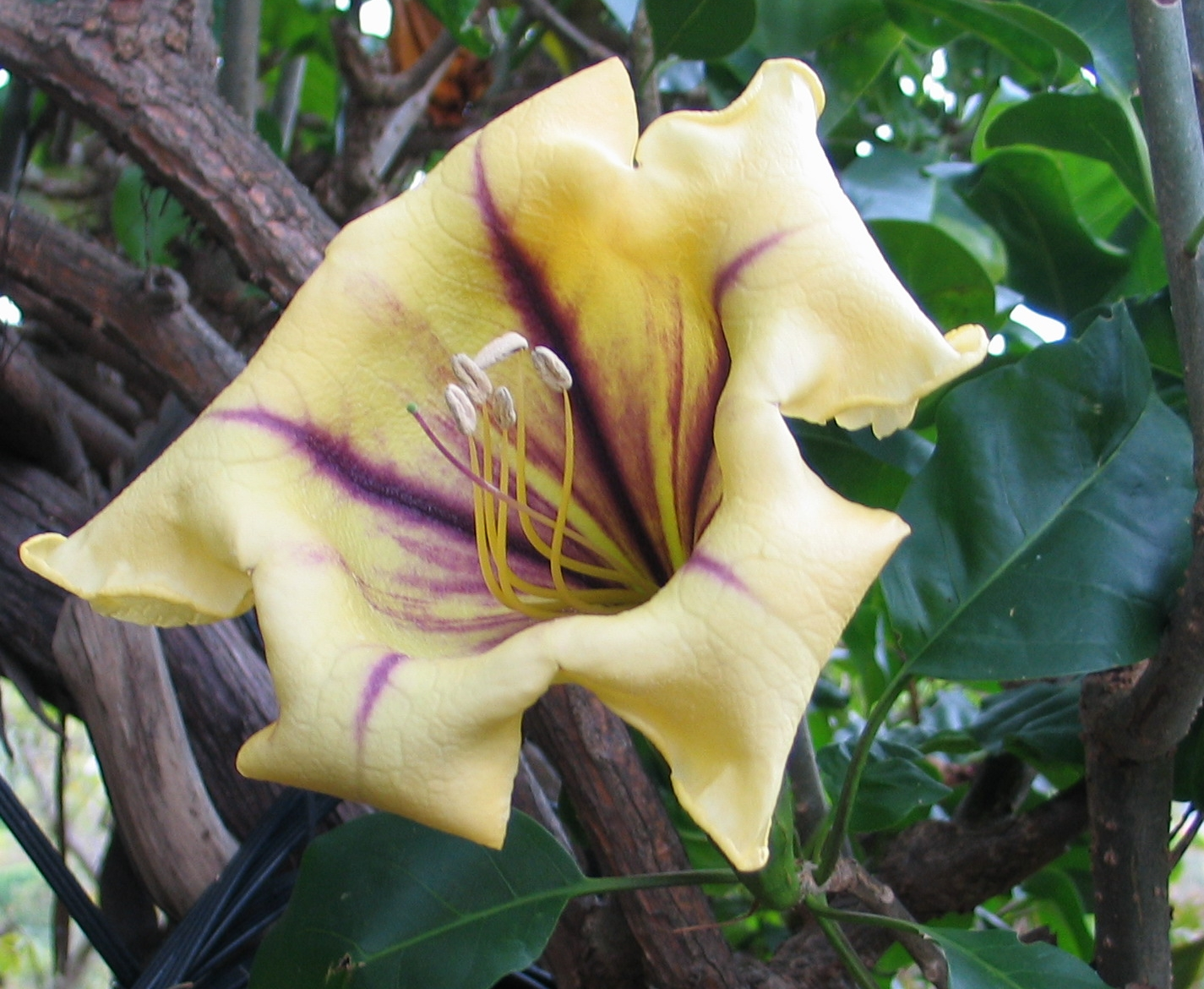 Solandra maxima flower